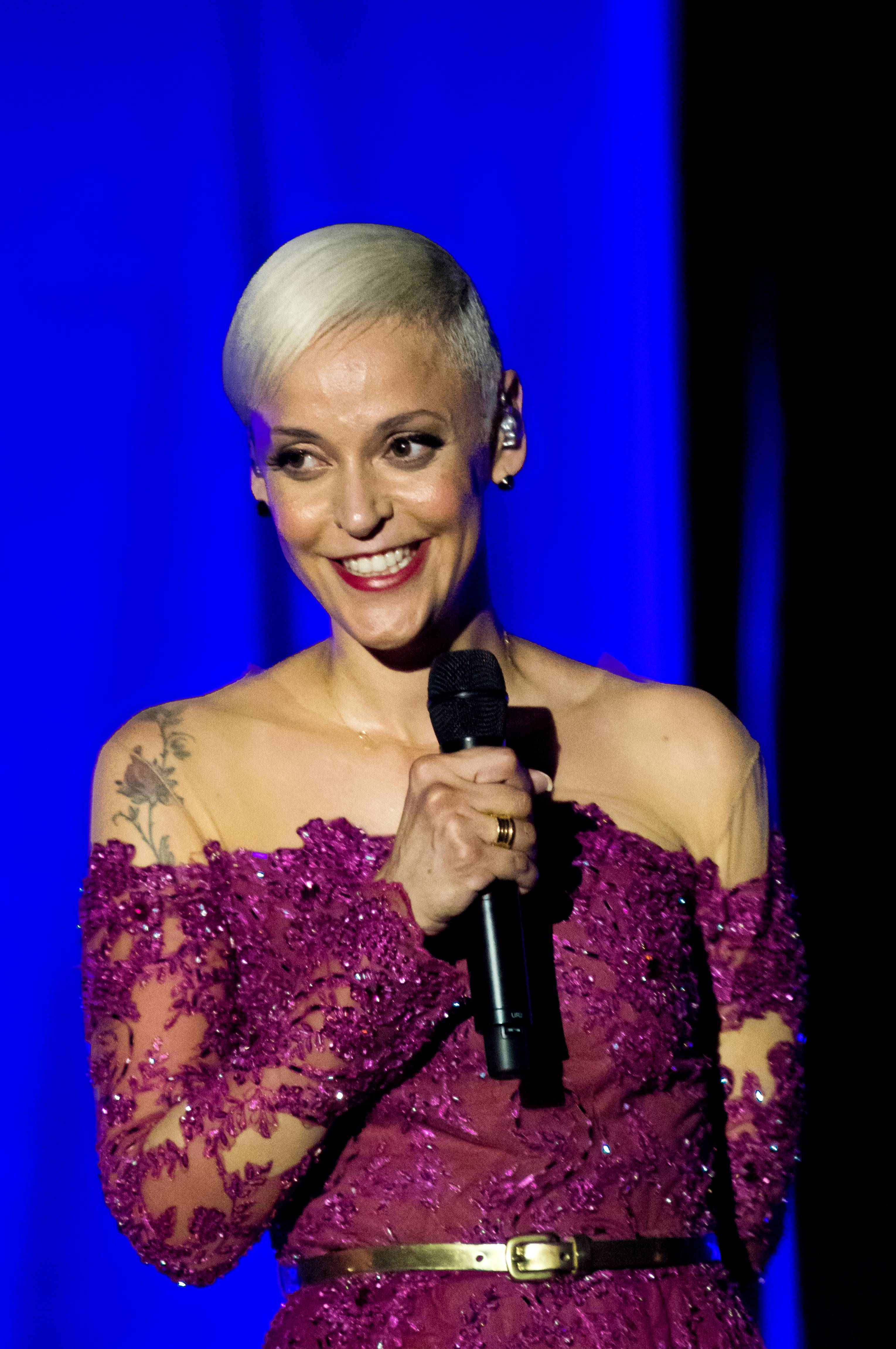 Bilder vom ZMF 2015 Mariza